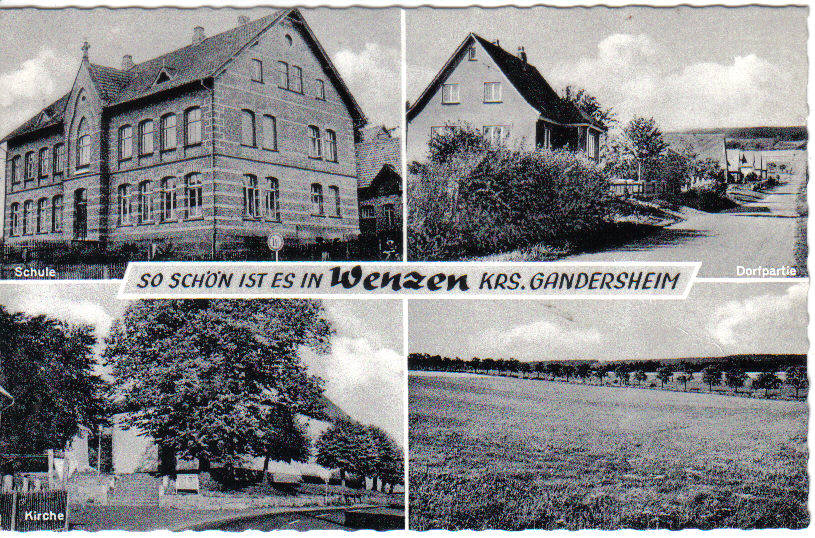 AK historische Ortsansichten Wenzen, vormals Kreis Gandersheim, jetzt Einbeck, Niedersachsen